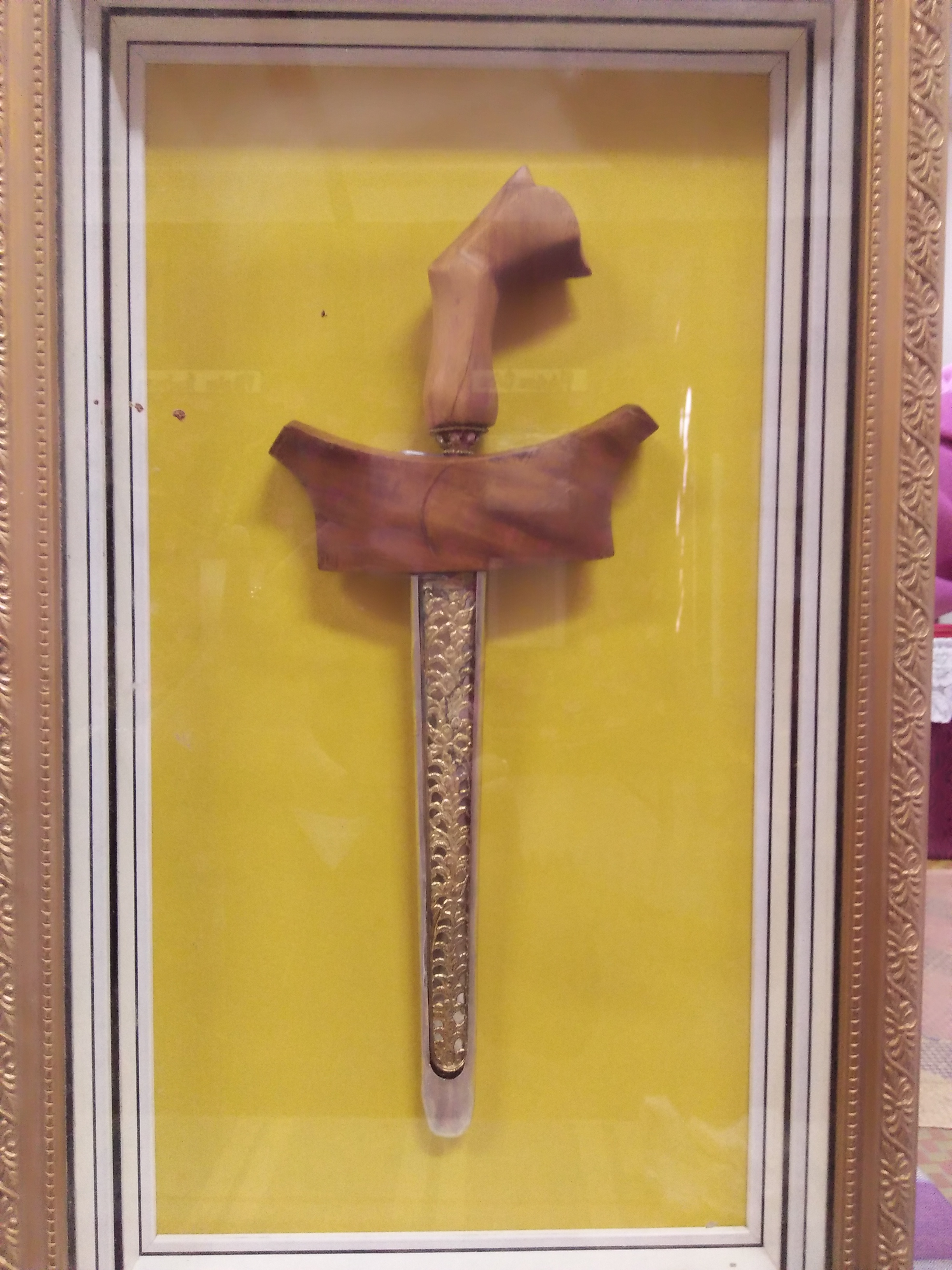 Keris, sebagai senjata penting bagi mempertahankan diri bagi masyarakat Melayu dan sungguh terkenal pada zaman dahulu, khususnya ketika kemunculan kesultanan Melayu seperti Melaka.